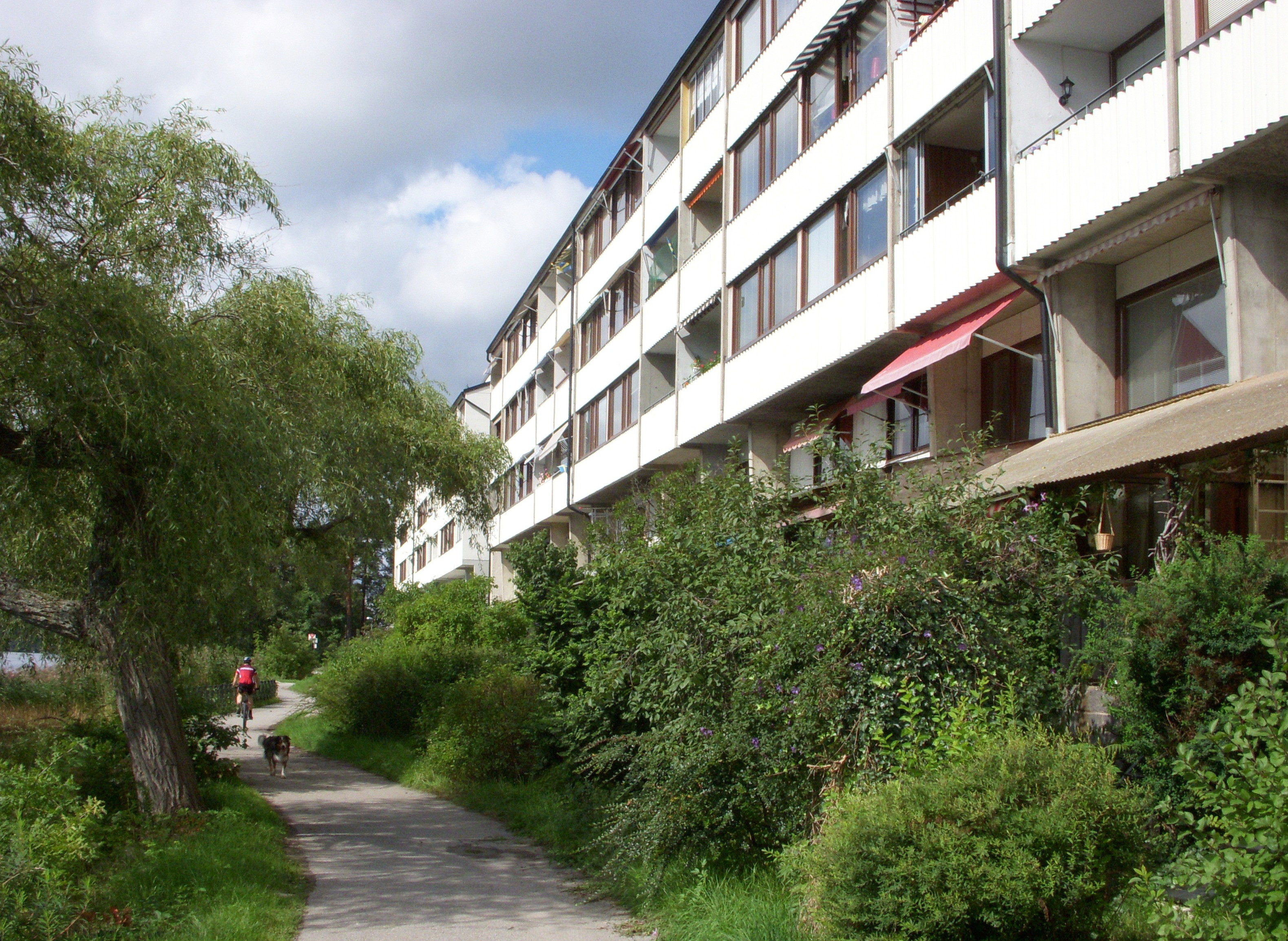 Bostadshus vid Strandliden i Hässelby strand, nybyggnadsår 1956-1958. Jöran Curman (Arkitekt), Nils Gunnartz (Arkitekt), Svenska Bostäder AB (Byggherre), Svenska Bostäder AB (Byggmästare)